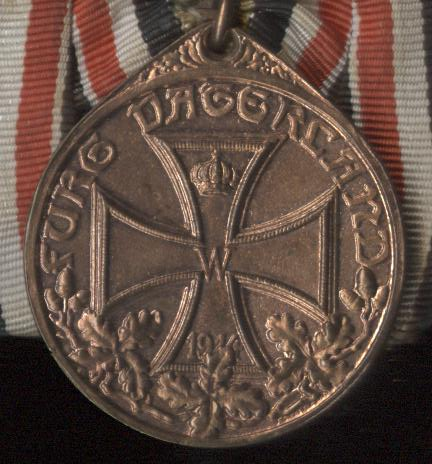 Die Deutsche Ehrendenkmünze des Weltkriegs, verkupferte Variante, am schwarz-weiß-roten Ordensband, Rückseite (Deutsche Ehrenlegion).